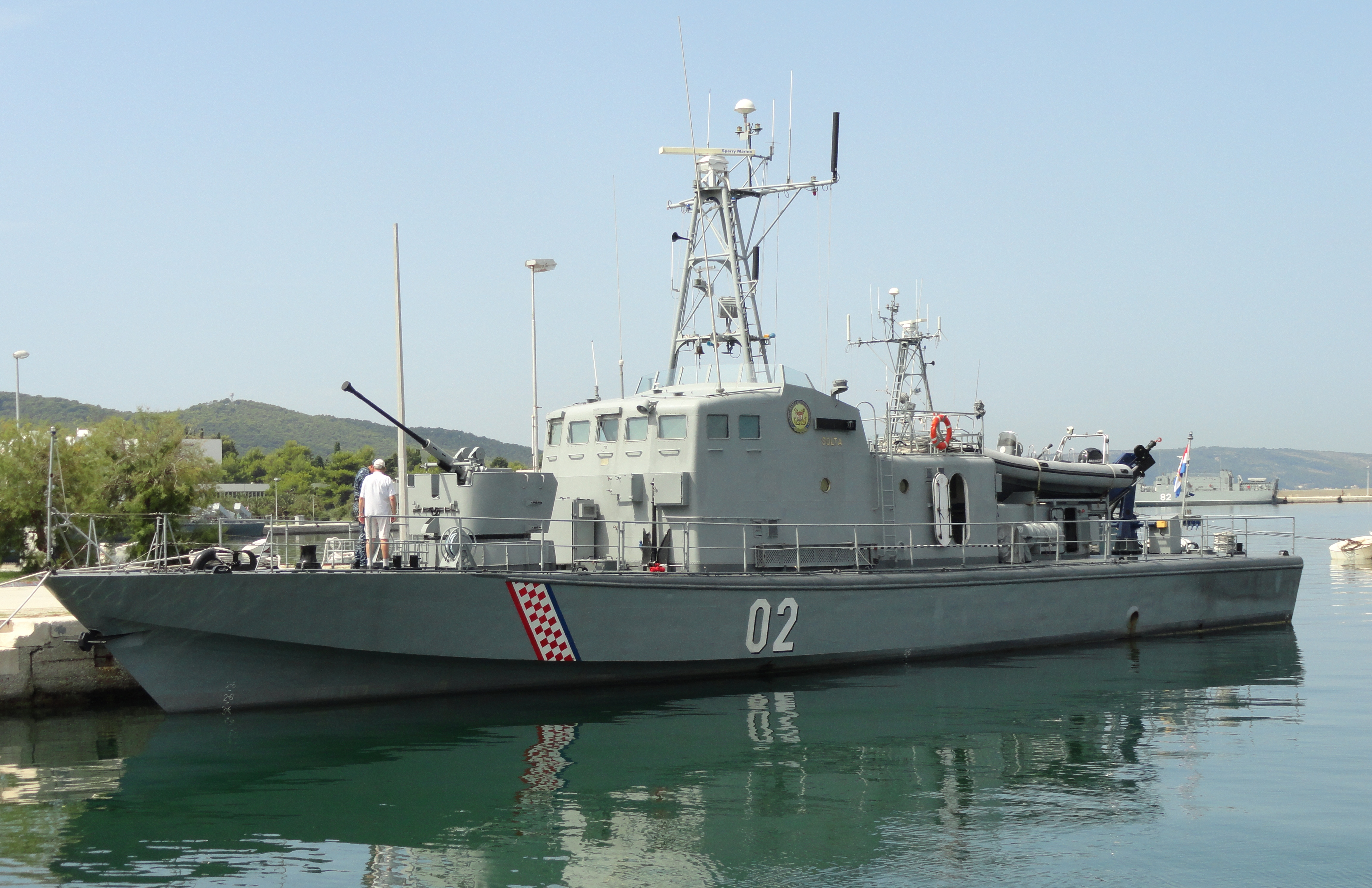 OB-02 Šolta u Lori.